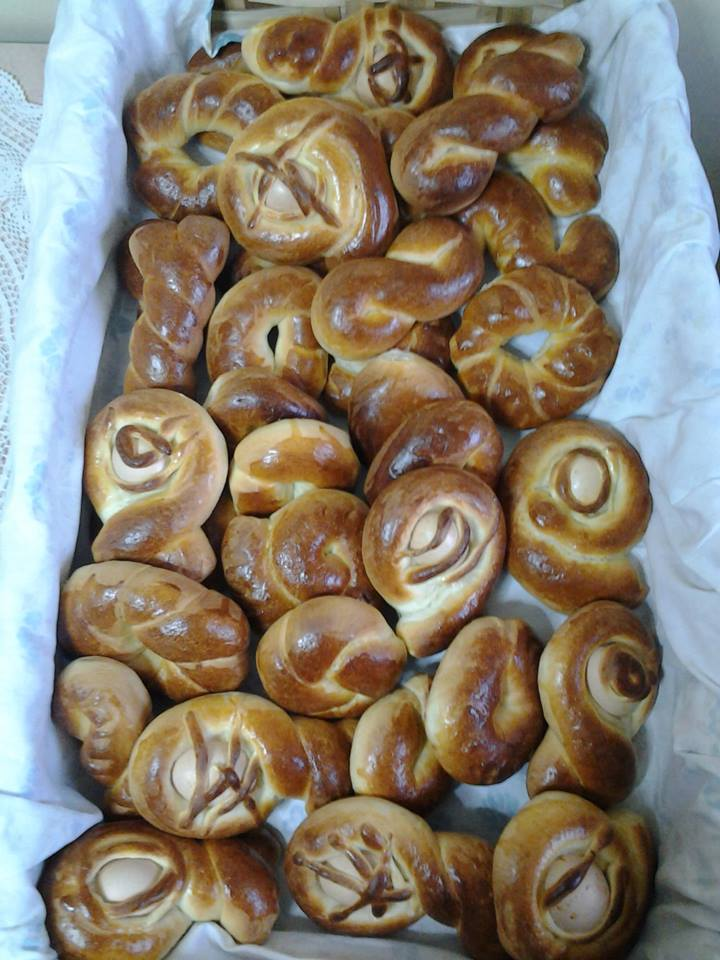 Sguta dolce pasquale tipico della Calabria